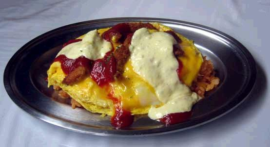 石川県金沢市の郷土料理であるハントンライス